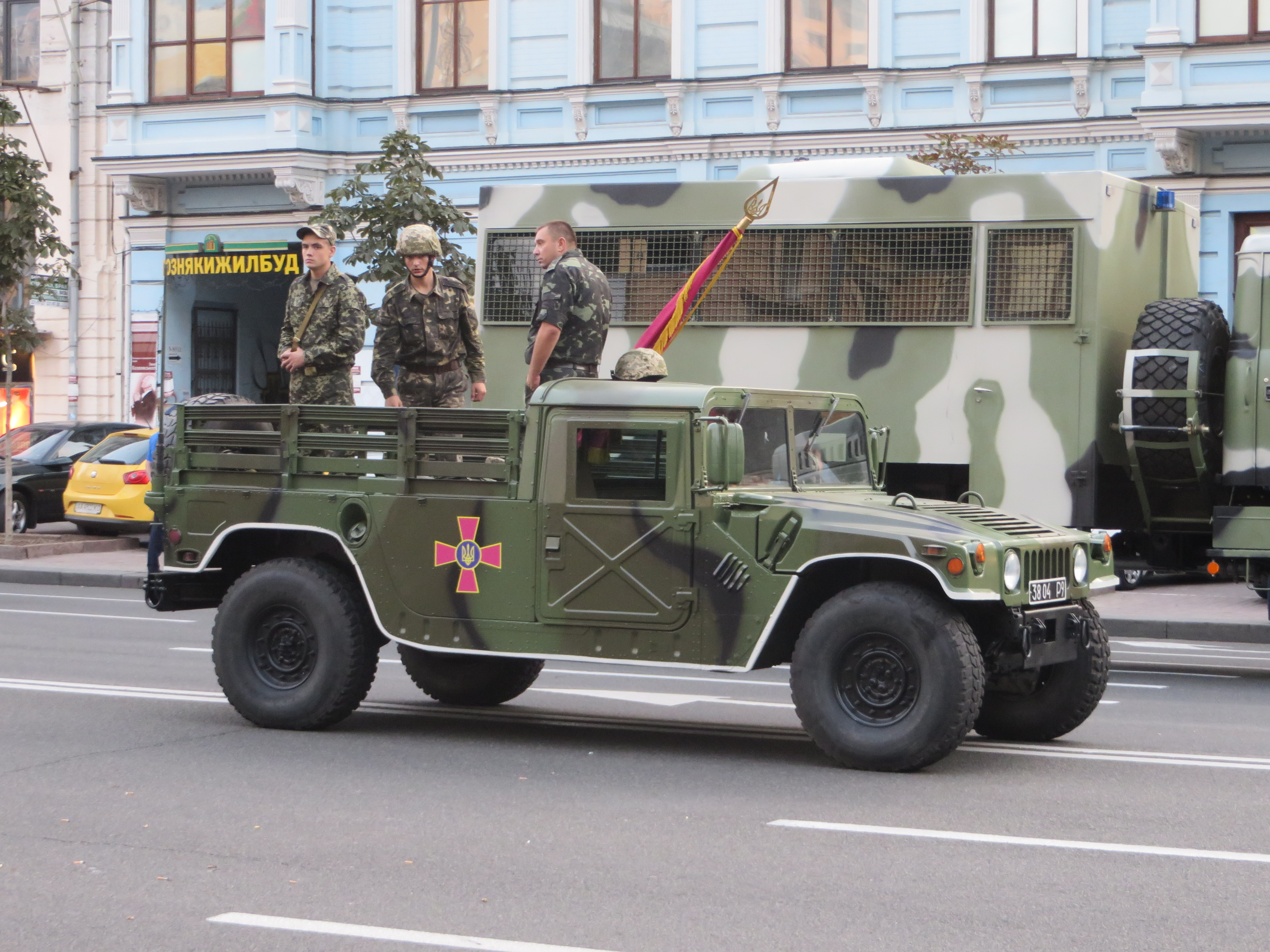 Український броньований автомобіль HMMWV під час тренувального маршу перед парадом на День незалежності, 22 серпня 2014 року, Київ, Україна.